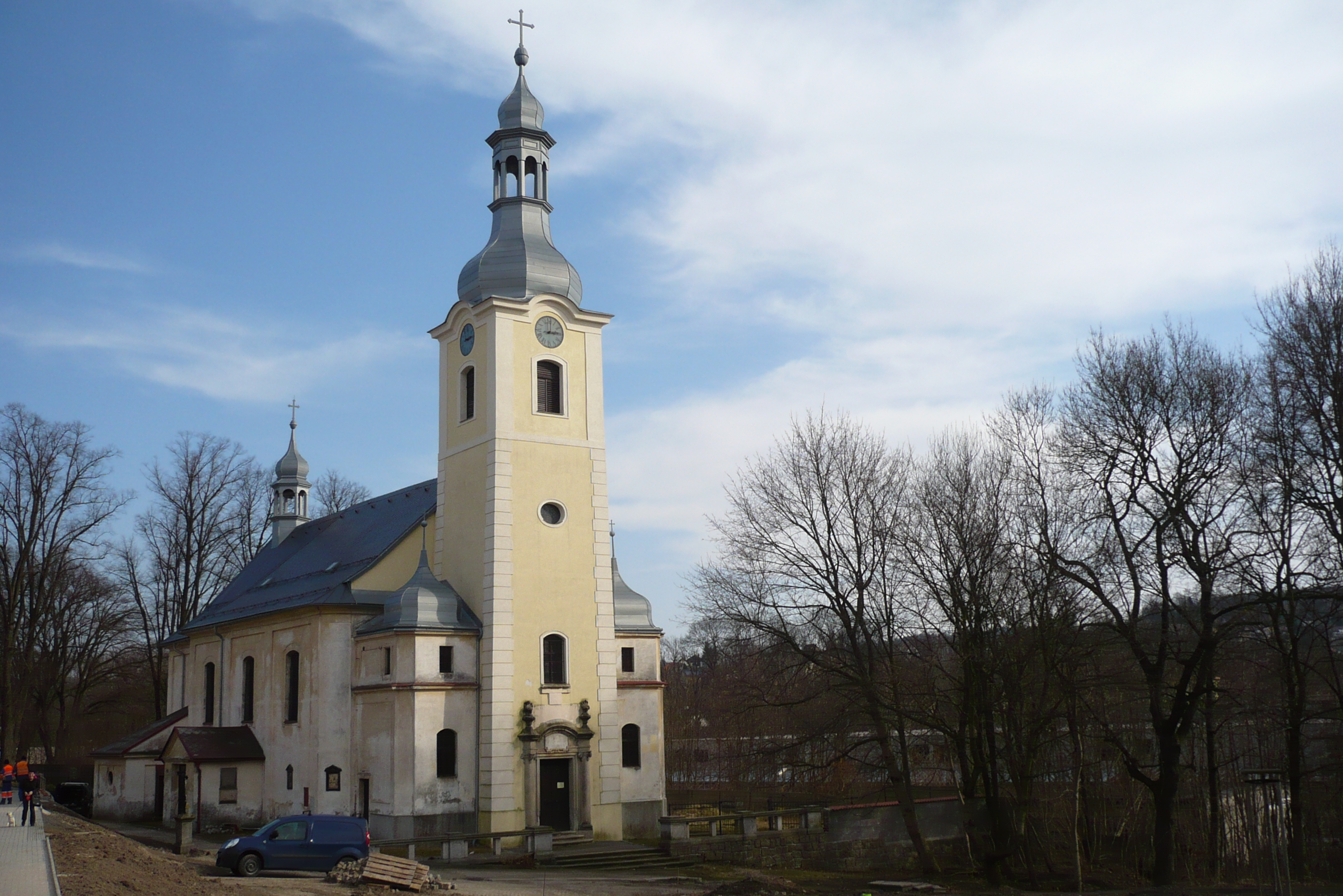 Kostel Nejsvětější Trojice (Vratislavice nad Nisou), ul. Tanvaldská, Vratislavice nad Nisou.